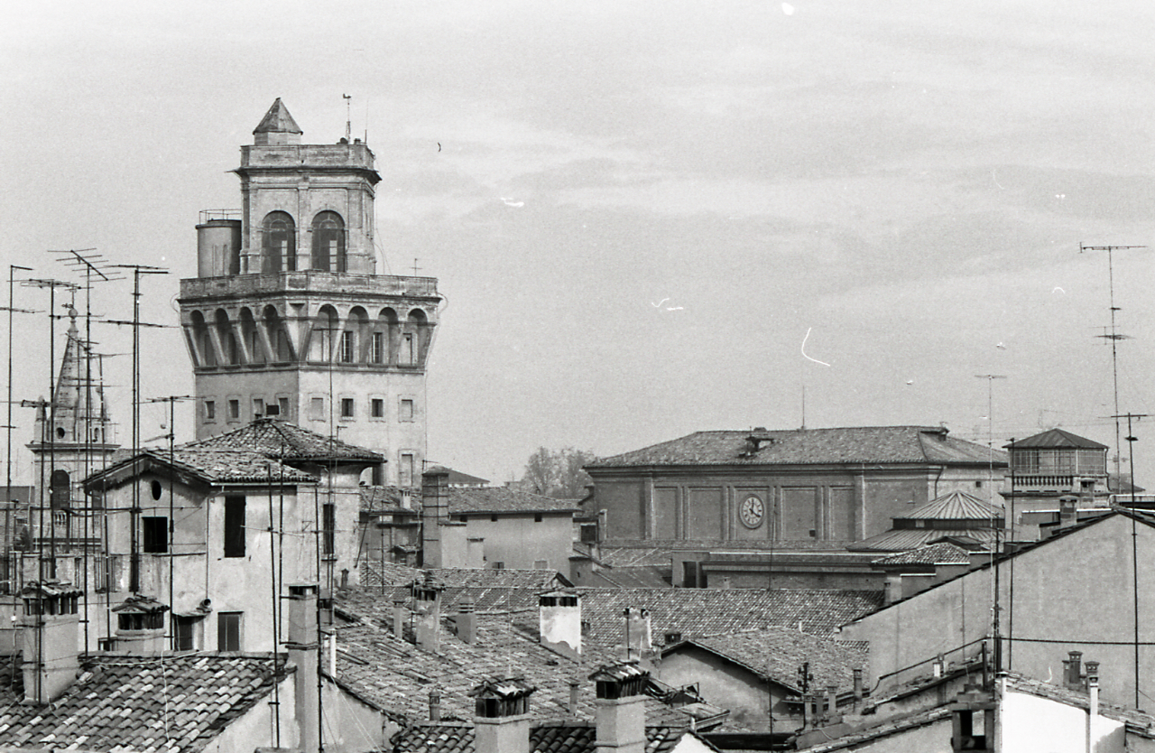 Servizio fotografico : Bologna, 1974 / Paolo Monti. - Strisce: 1, Fotogrammi complessivi: 3 : Negativo b/n, gelatina bromuro d'argento/ pellicola ; 35 mm. - ((Sul portanegativi: N[I]K[MA]T FP4. - All'interno del portanegativi: la serie è anche identificata da una linea orizzontale a pennarello nero che separa la suddetta serie dalla precedente di soggetto diverso. - e da un'iscrizione inventariale manoscritta a pennarello nero ("2681bis )") in corrispondenza dei relativi fotogrammi. - Occasione: Pubblicazione. - Fonte: Agenda di Paolo Monti: Leica 1501-3000 Controllo numerazione (1950-1978), presso Archivio Paolo Monti. - Fonte: Monografia di Università degli studi [Bologna]: Rassegna storica dell'insediamento: catalogo ragionato delle realizzazioni edilizie universitarie in rapporto all'assetto urbano, Bologna, Tip. Labati e Nanni (1974). - Fonte: Fattura di Paolo Monti: IV. Commesse/ Fattura n. 20 (1974/10/21), presso Archivio Paolo Monti